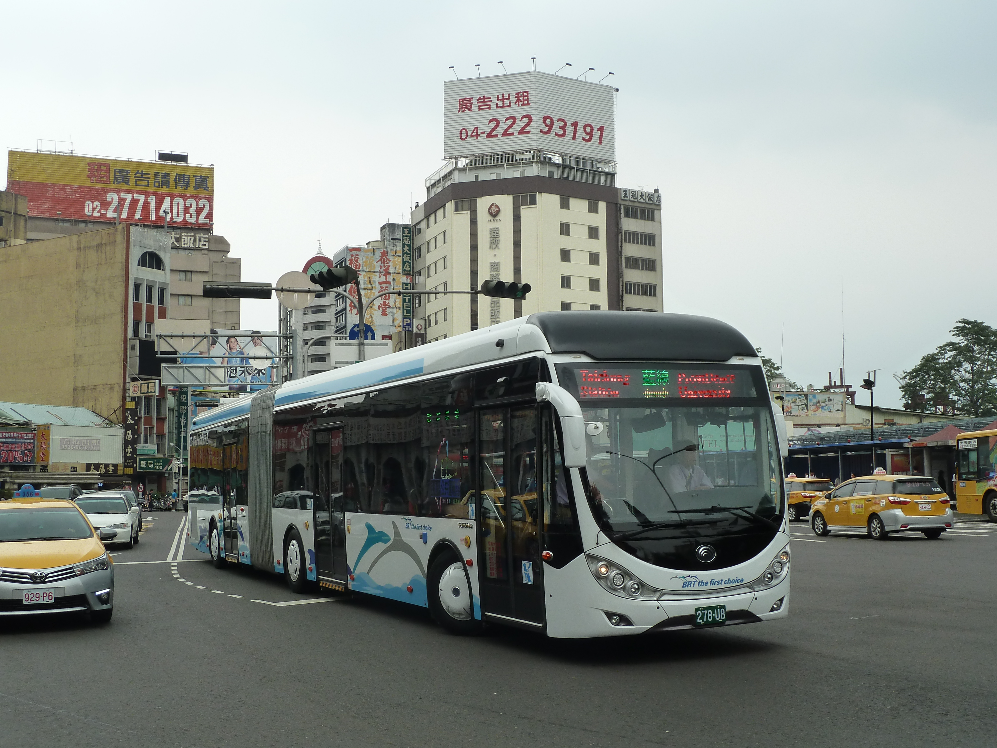 中文（台灣）: 臺中快捷巴士公司宇通雙節大客車278-U8，行駛臺中市快捷巴士藍線，準備進入臺中火車站